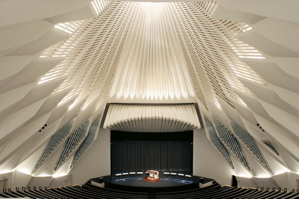 Organo Auditorio de Tenerife 2005